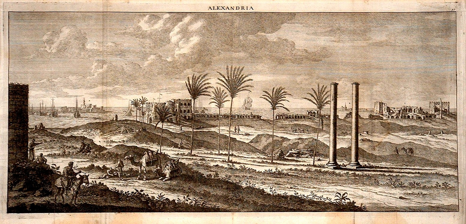 Alexander old drawings